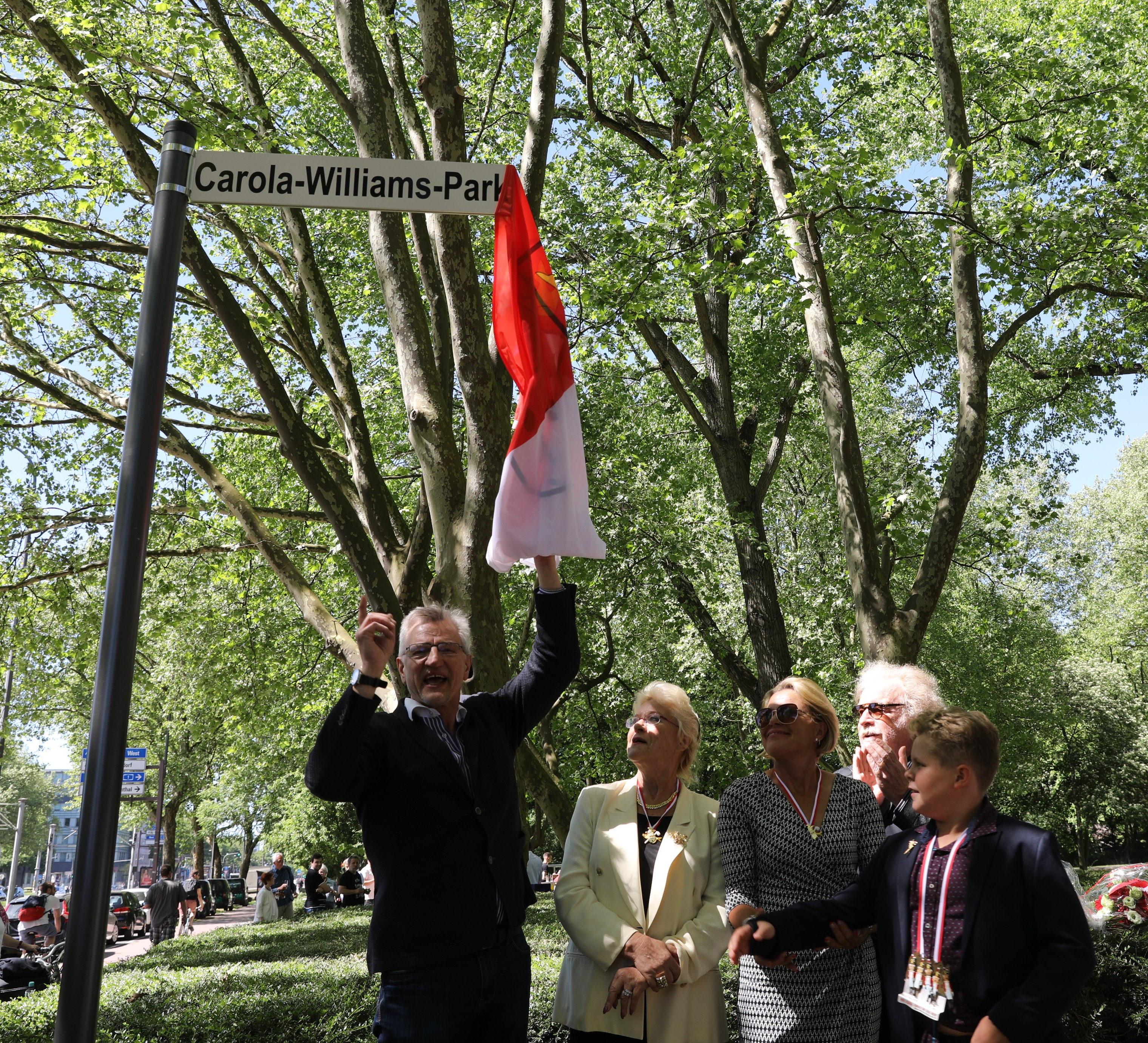 Enthüllung des Schildes Carola-Williams-Park, v.l.n.r. Andreas Hupke, Jeanette Williams, Carolas Enkelin Caroline, Bernhard Paul, Carolas Urenkel Dominik